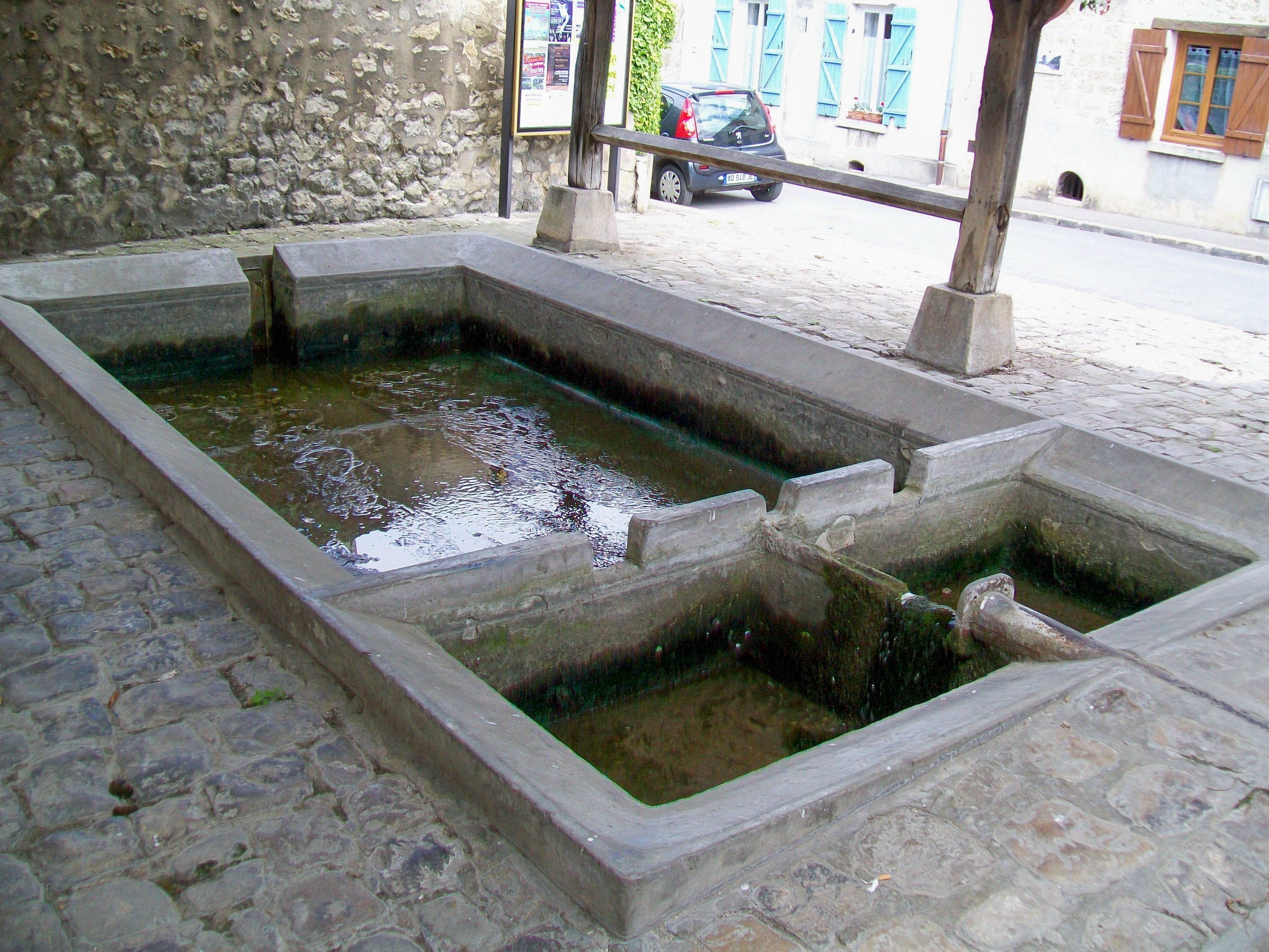 L'intérieur du lavoir de la rue du Montcel, qui se situe face à la rue des Panilliers.